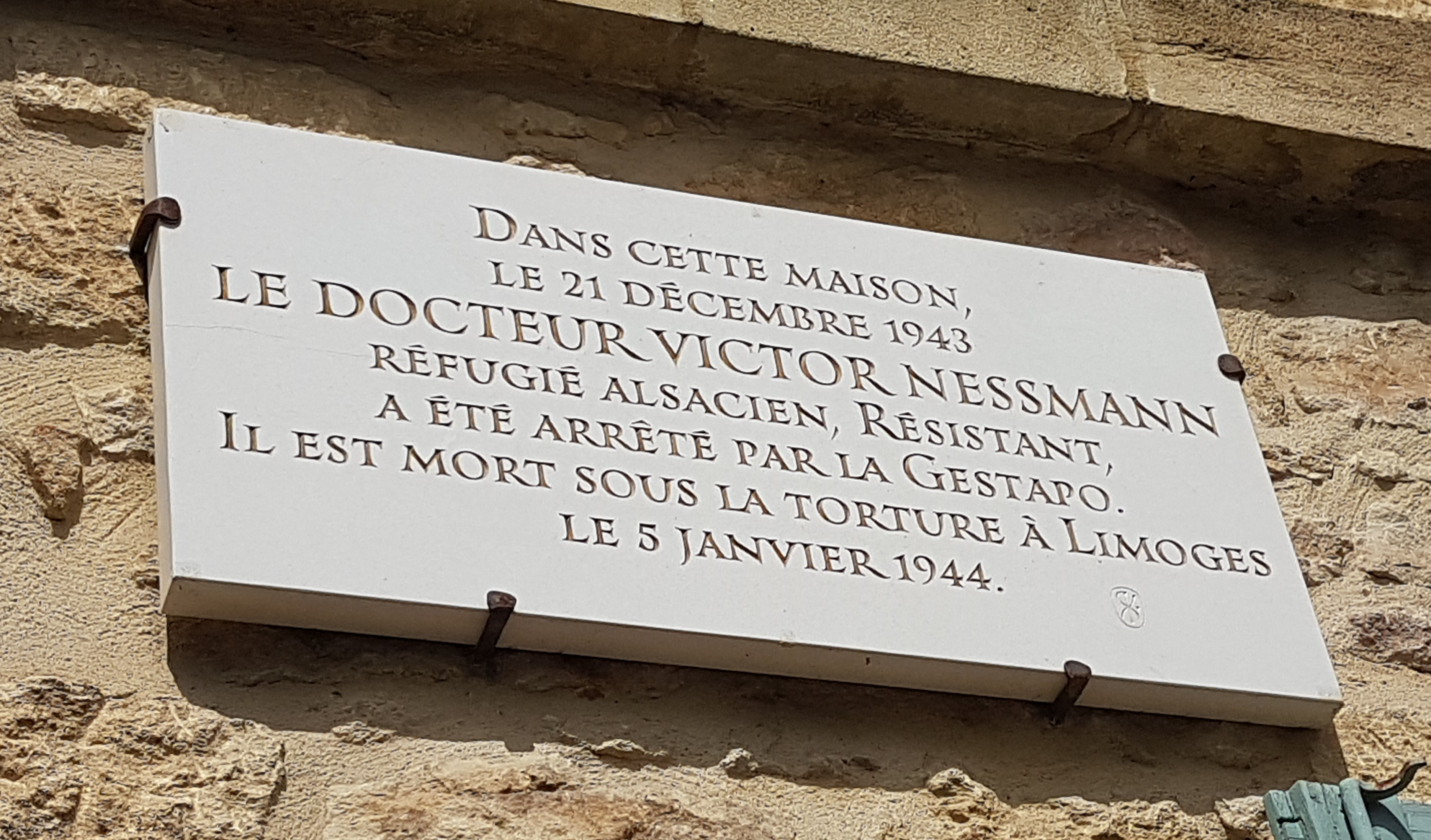 Plaque apposée au 11 boulevard Nessmann, à Sarlat-la-Canéda, commémorant le résistant Victor Nessmann